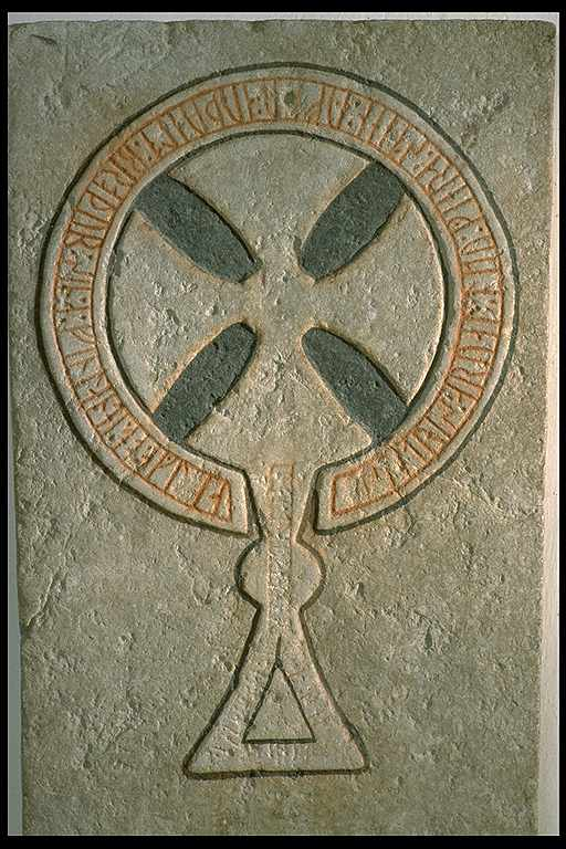 Inskriften lyder: Sigtryggs arvingar lät göra stenen över Audvald (?), sin broder. (Han) dog i Finland .. G319 Rute